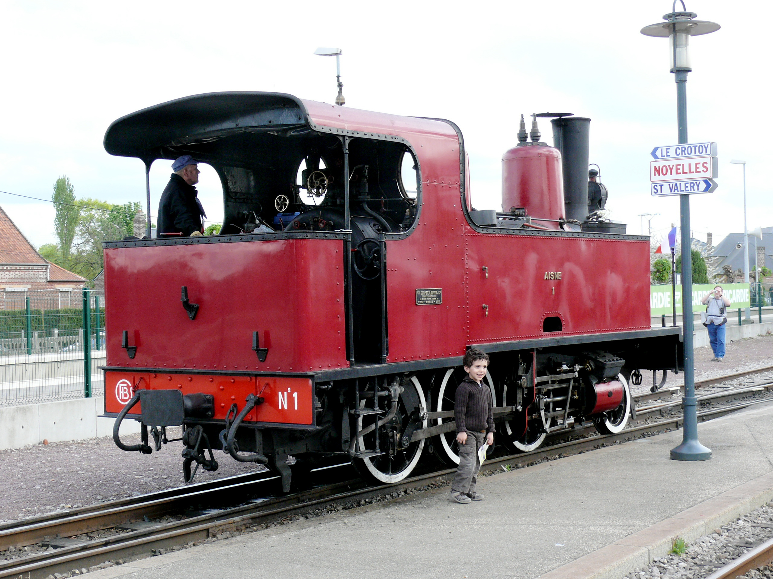 Locomotive 130T Corpet Louvet ex réseau départemental de l'Aisne N°1, restaurée par le Chemin de fer de la baie de Somme, en gare de Noyelles lors de la Fête de la vapeur 2009 de ce réseau secondaire